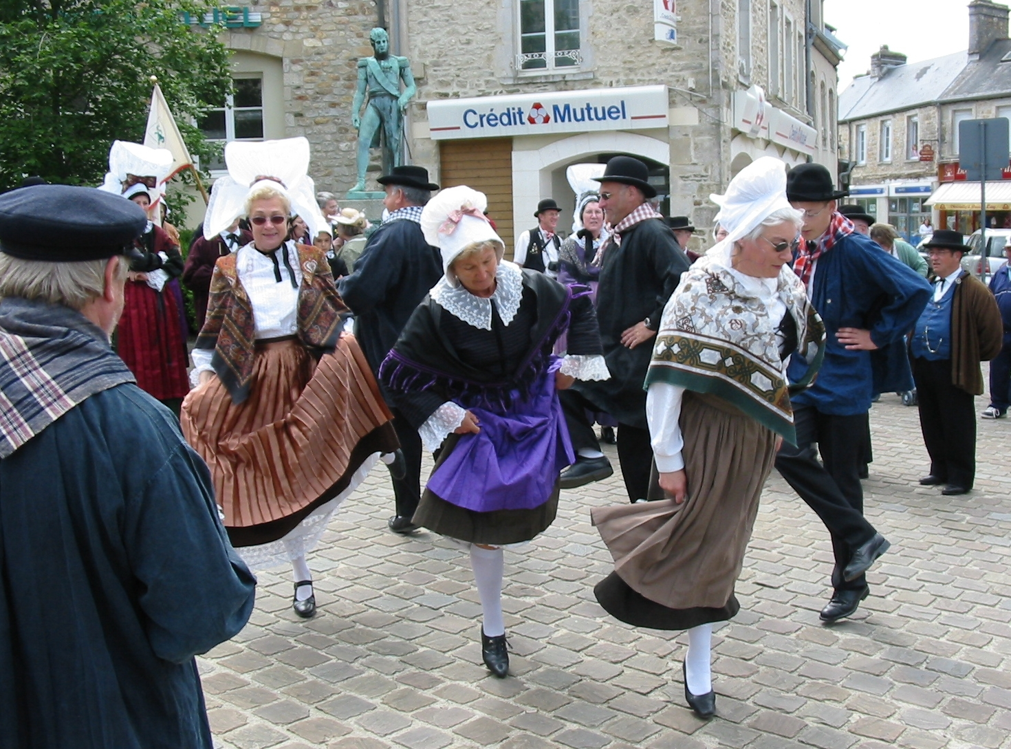 Fête Normande (Fête des Rouaisouns), Bricquebec, Mai 2007